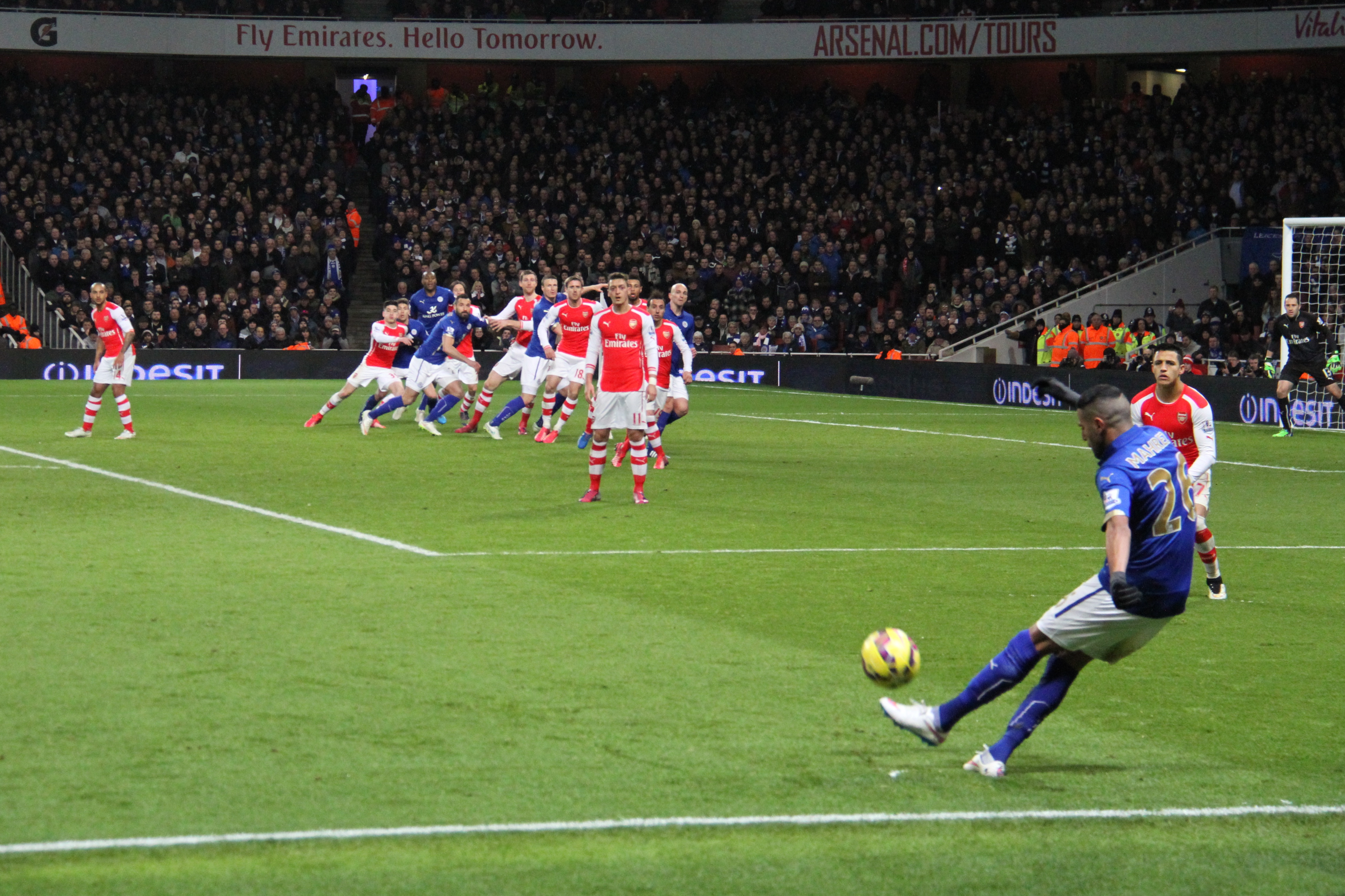 Mahrez free kick 1